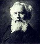 Maximilian Schmidt called "Waldschmidt" (1832 - 1919); Bavarian author